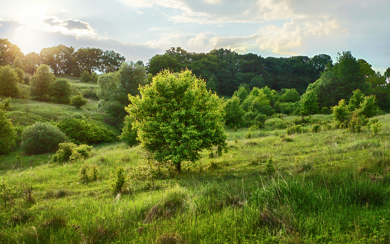 Груша обыкновенная, или дикая (Pyrus communis). Балка Пёстрая в родовом экопоселении «Кореньские родники». Белгородская область.